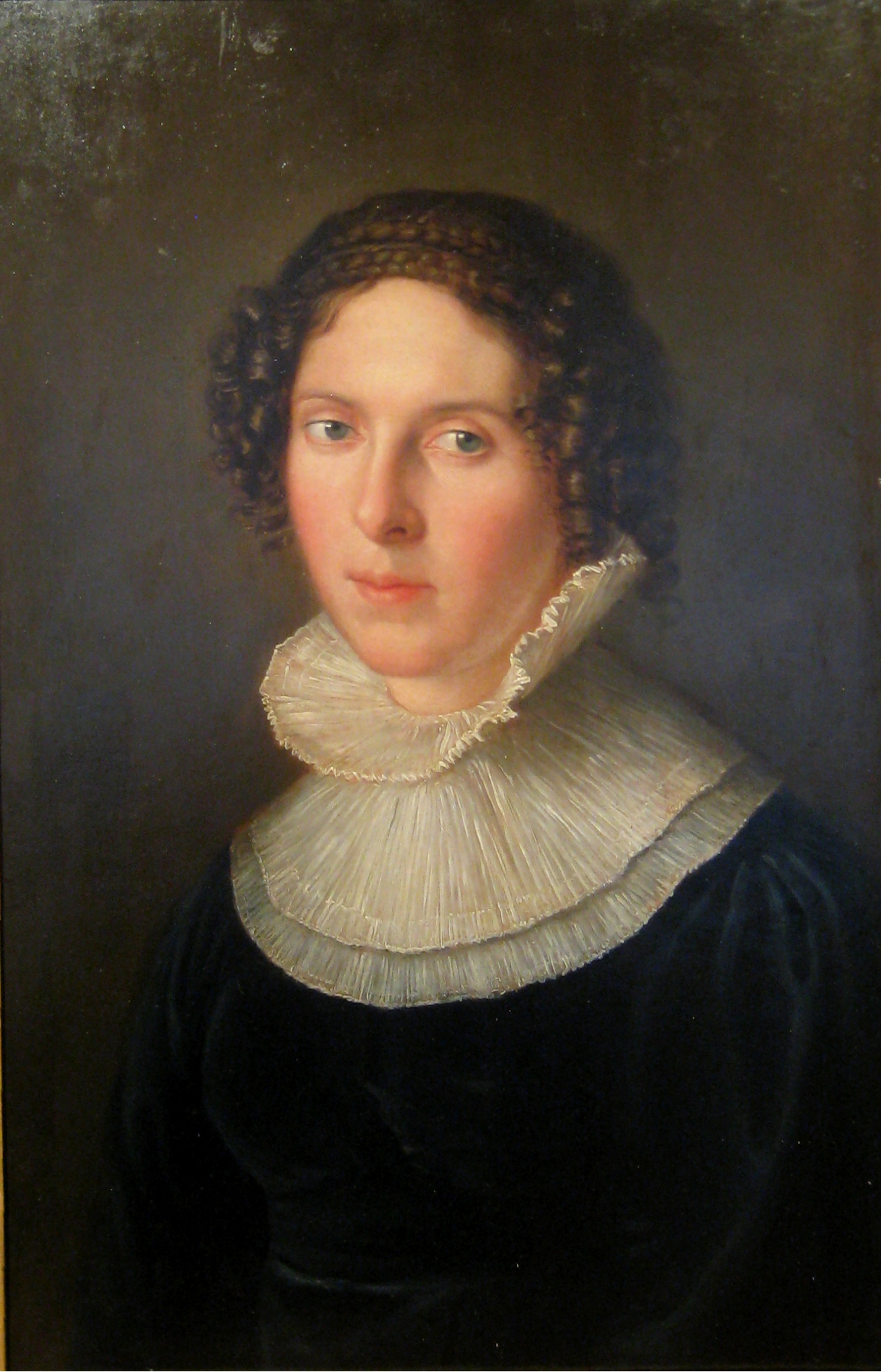 В. Тропинин. Портрет Елизаветы Ивановны Нарышкиной (1791-1858), фрейлина. Музей Тропинина